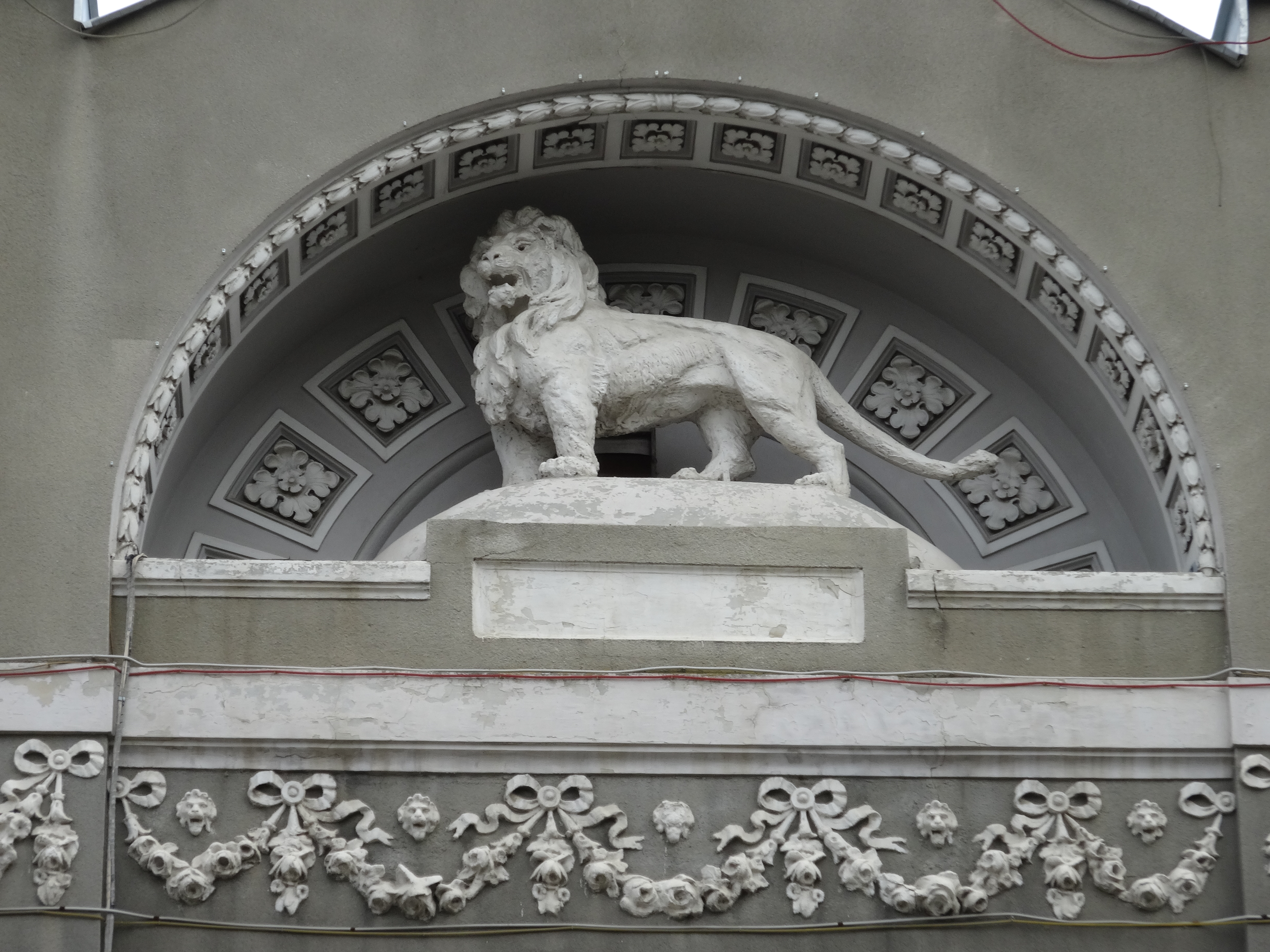 Дом Бендера (в котором 3 этаж занимала Татарская гостиница): улица Радищева 26, угол ул. Первомайская, 78, Саратов, Саратовская область. 1912 г.